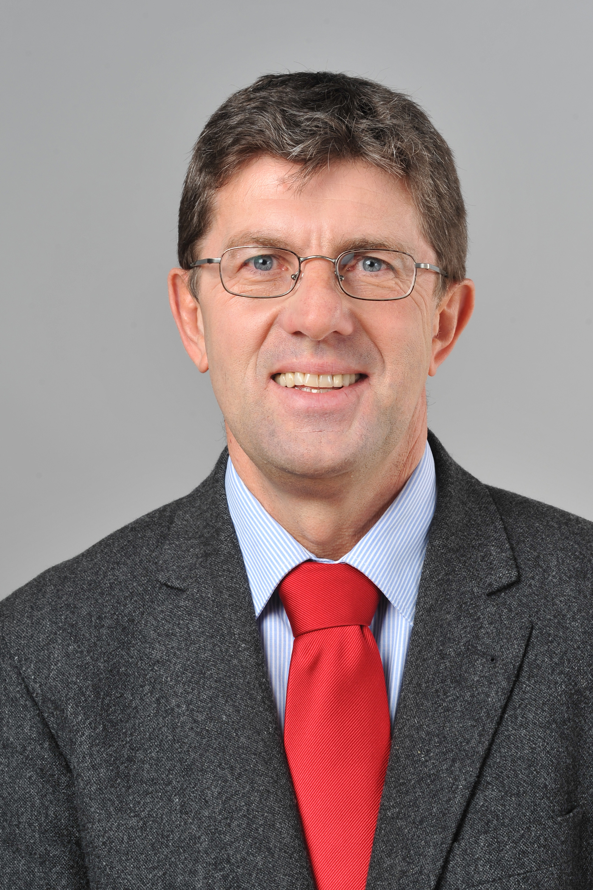 Landtagsprojekt Nordrhein-Westfalen 27. - 29. November 2013 Thomas Marquardt